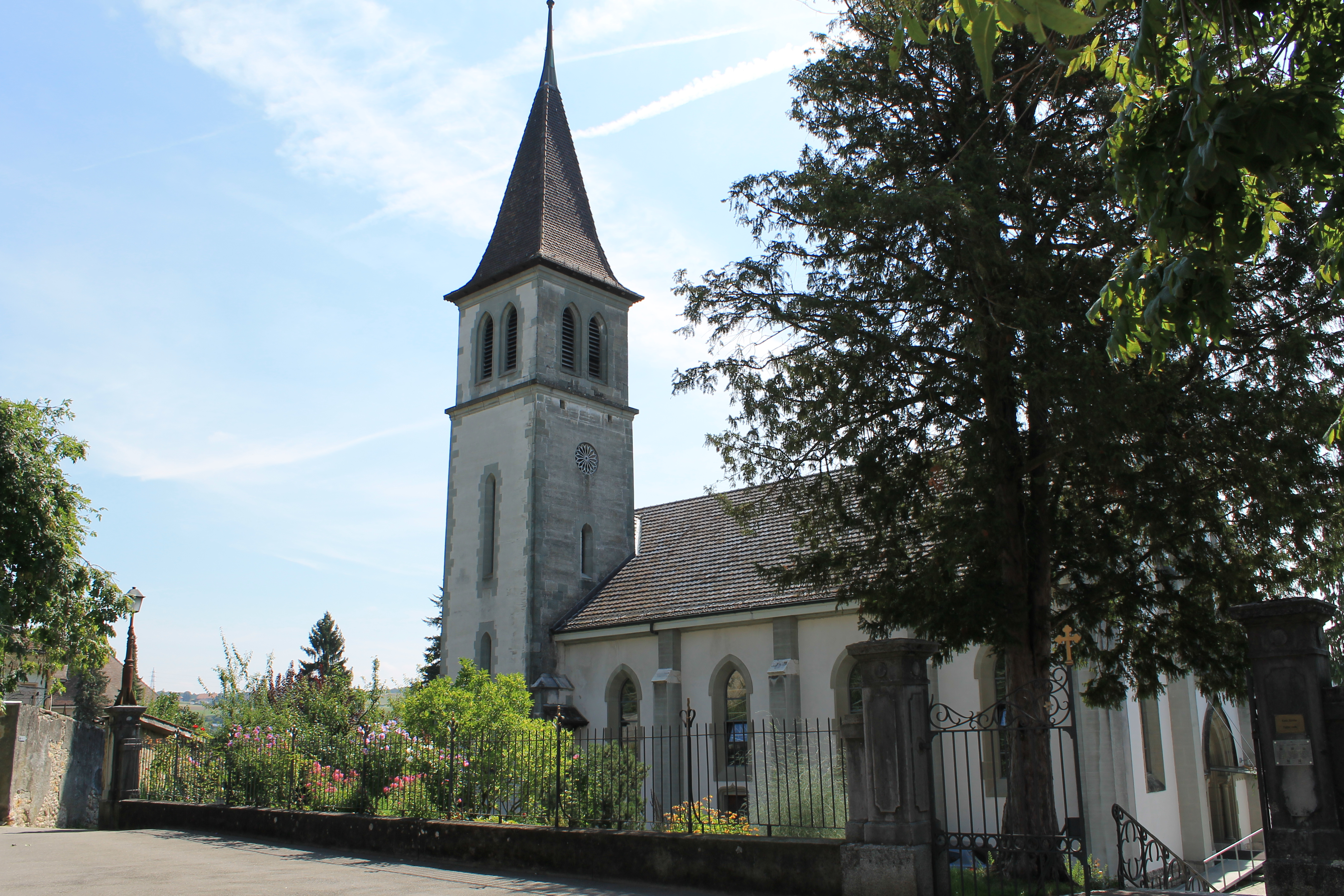 Morat